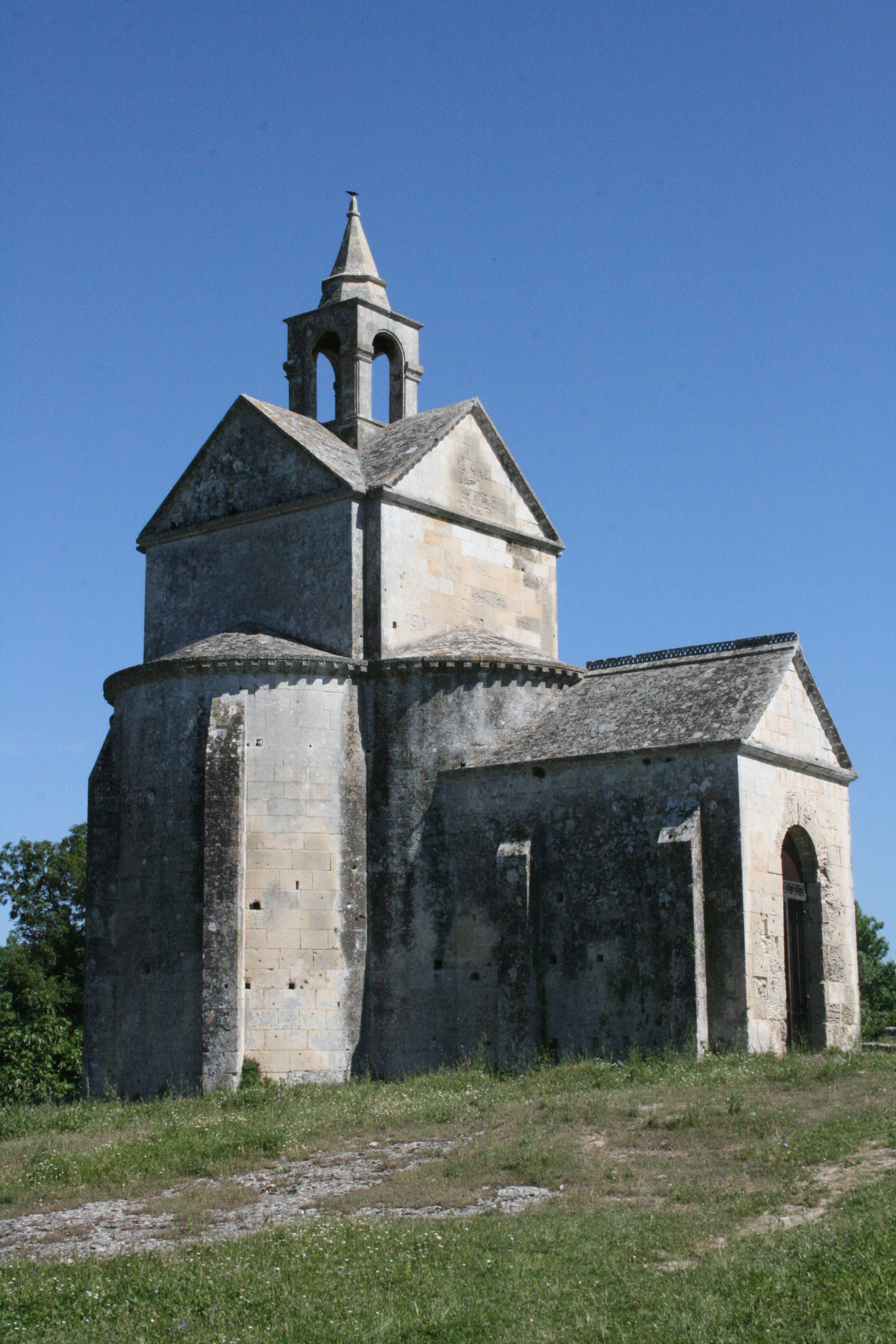 Montmajour (département des Bouches-du-Rhône), France. Chapelle Sainte-Croix, style roman, XIIe siècle